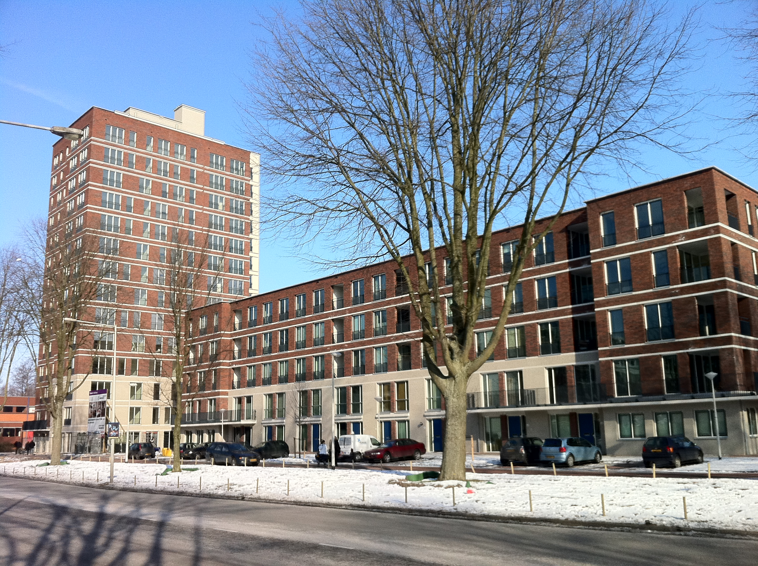 Amsterdam. Amsterdam-Noord - Nieuwbouw Dijkmanshuizenstraat